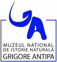 Logo du Muséum national d'histoire naturelle „Grigore Antipa” de Bucarest